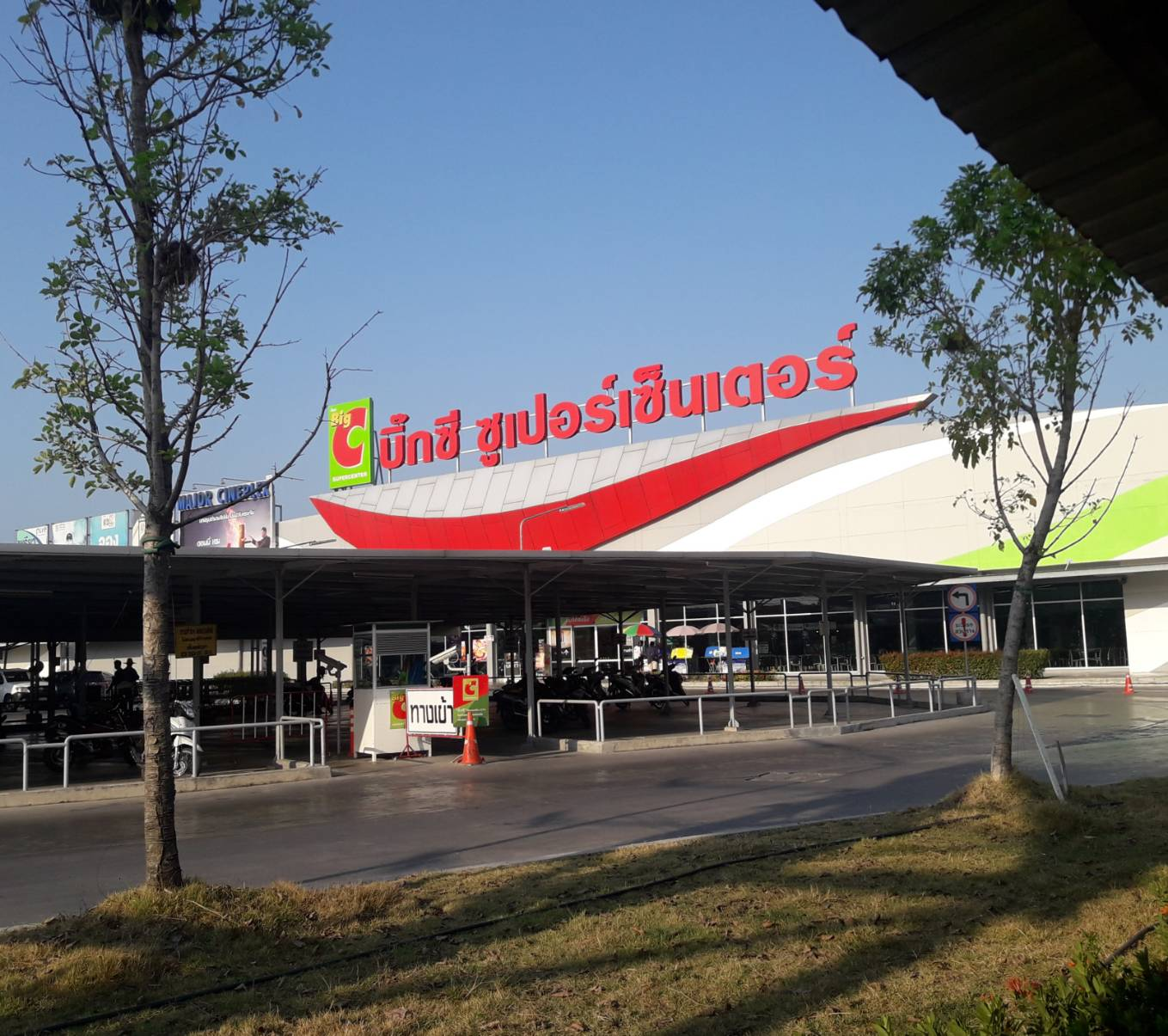 บิ๊กซี ซูเปอร์เซ็นเตอร์ สาขาปทุมธานี